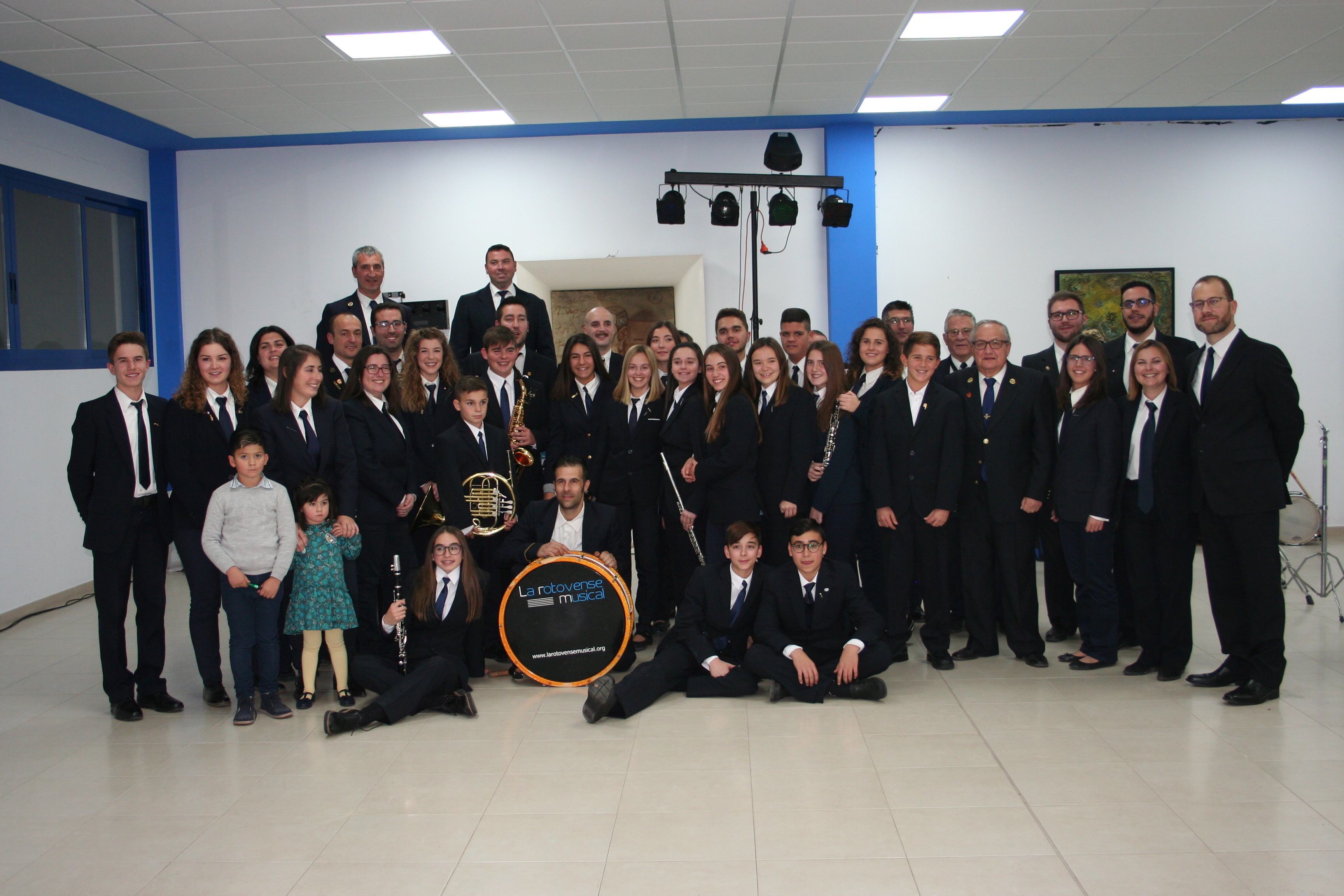 La Rotovense Musical. Concert de Santa Cecília 2017. Ròtova